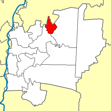 Арметовська сільська рада